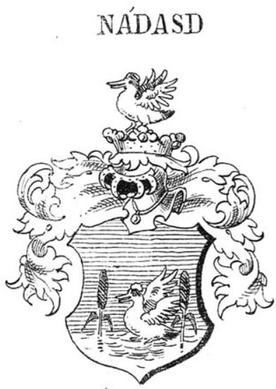 A Nádasd nemzetség cimere